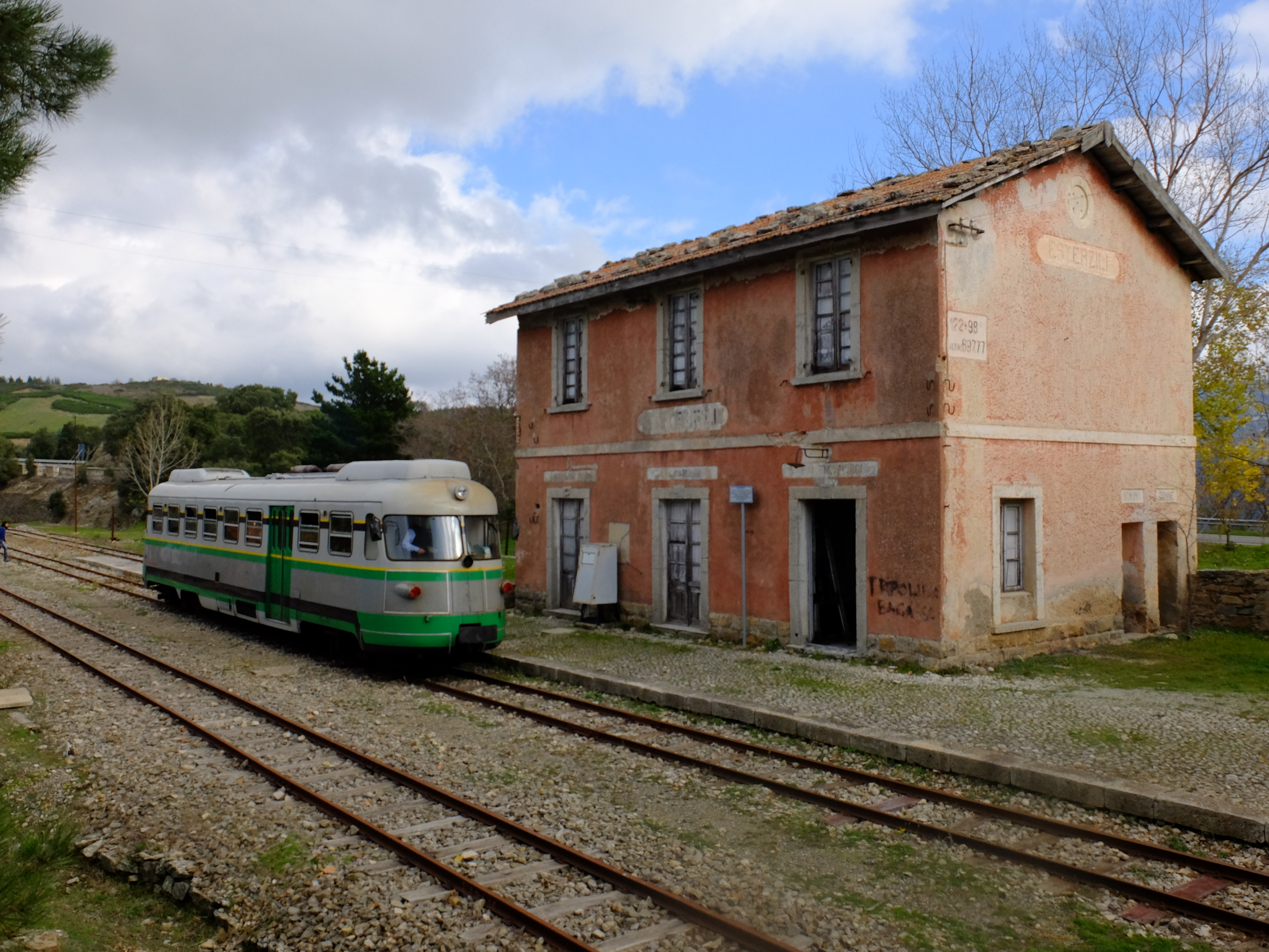 ARST ADe.05 im Bahnhof Esterzili